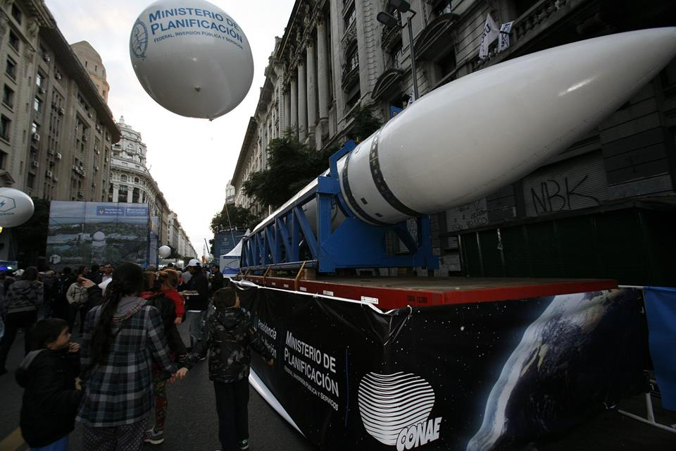 El prototipo del cohete Tronador II, VEX1A, en los festejos del 25 de Mayo en Buenos Aires